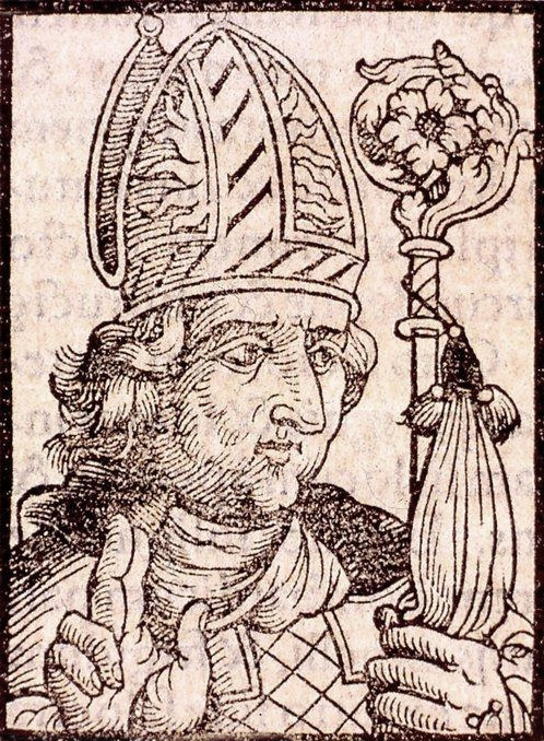 Ioannes Pastor Argentinensis, Buste, 3/4 à dr. Bibliothèque nationale et universitaire de Strasbourg